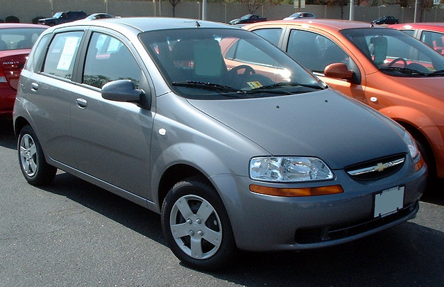 2006 Chevrolet Aveo 5 door